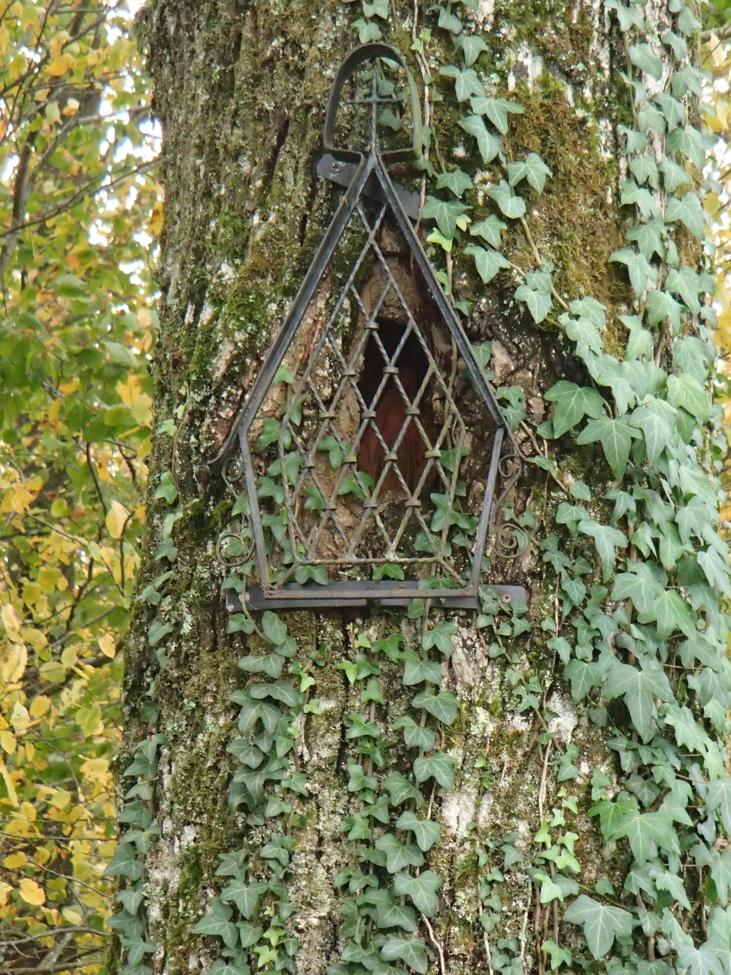 Vierge